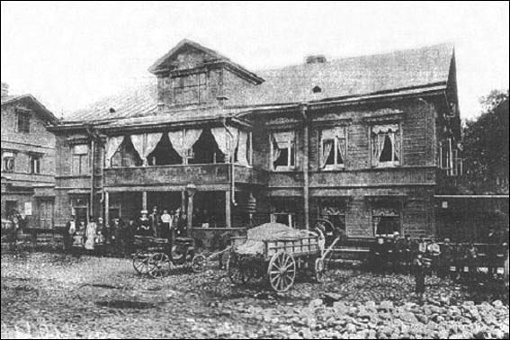 Фотография трактира «Красный кабачок», 1907 г.